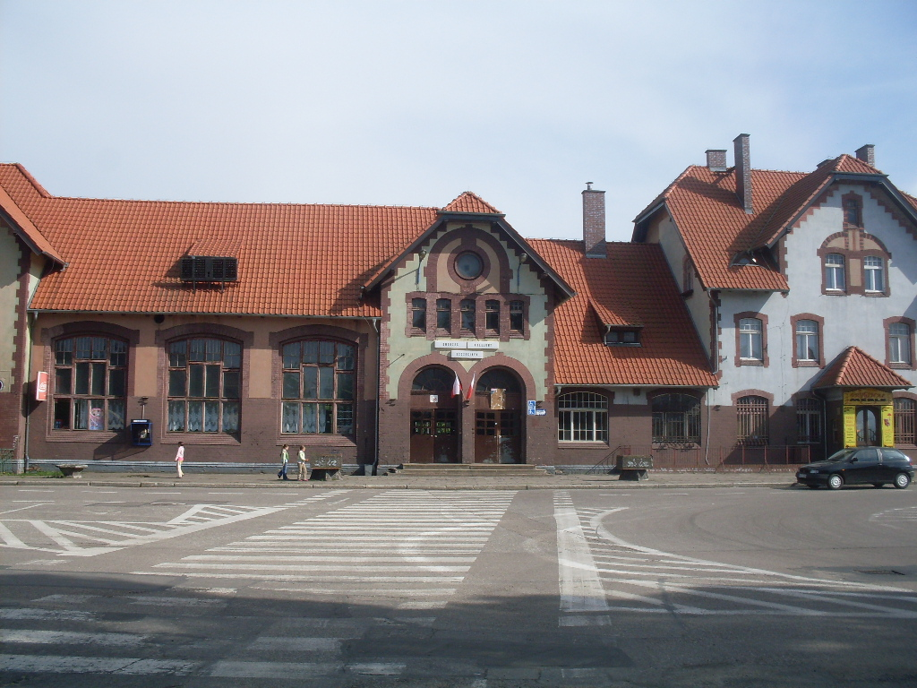 Dworzec kolejowy w Szczecinku.